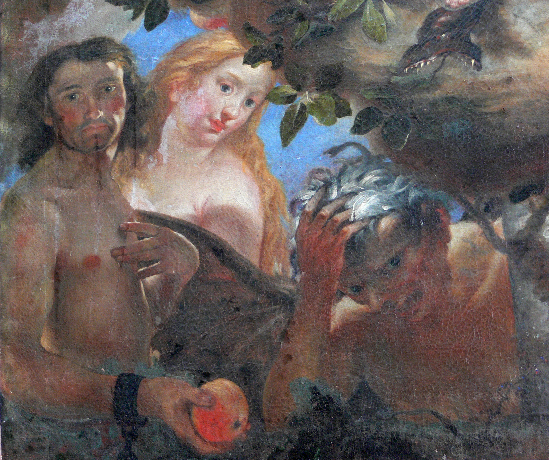 Wallfahrtskirche Maria zum Berge Karmel, Baitenhausen, Stadt Meersburg, Bodenseekreis Gemälde "Immaculata", um 1705–1715, Johann Michael Feichtmayr d. Ä. zugeschrieben; Detail: Adam und Eva (im Adam wird ein Selbstporträt des Malers vermutet)